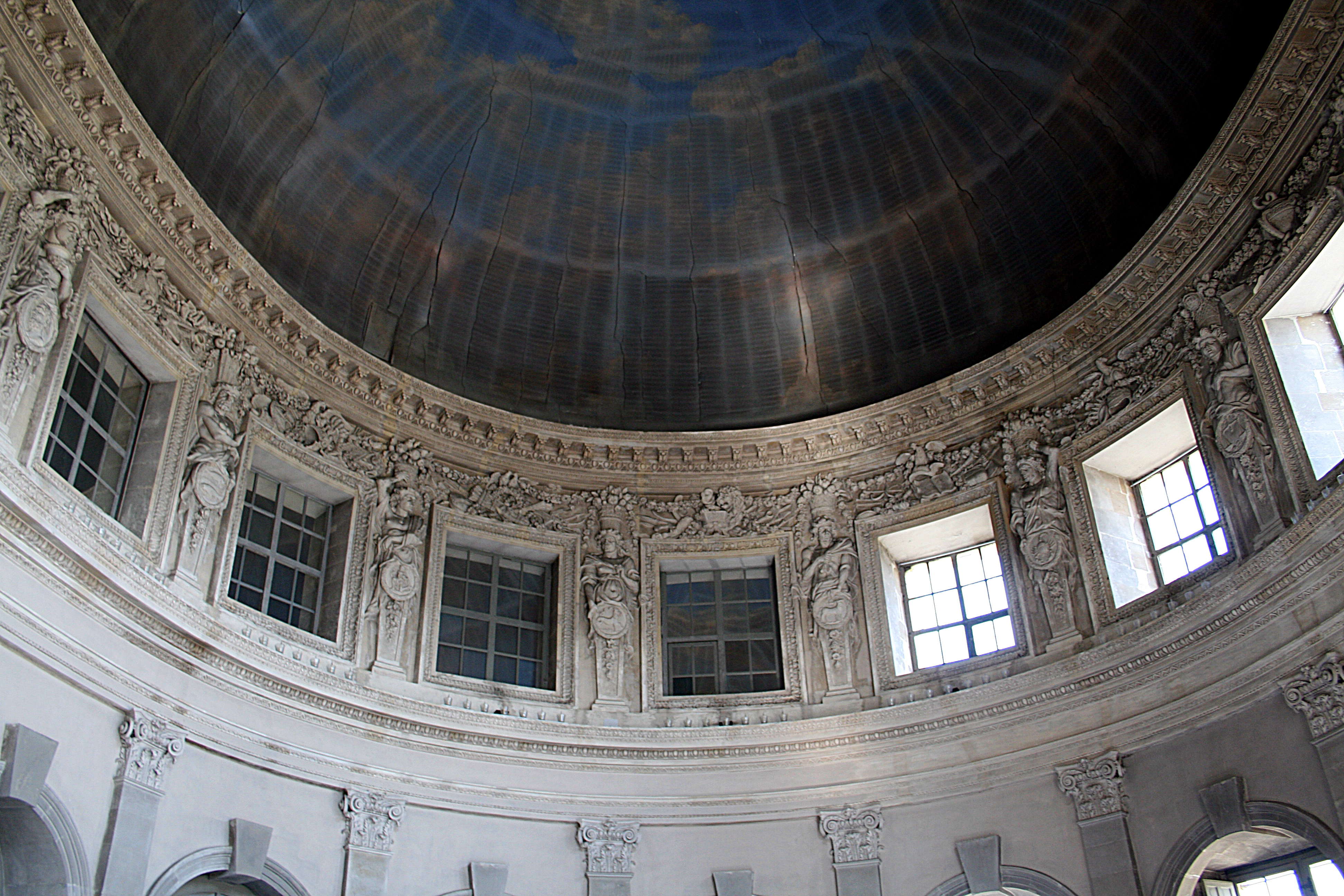 Termes et reliefs, décor sculpté réalisés sous la direction de Charles Le Brun entre 1658 et 1661 pour orner le Grand Salon du château de Vaux-le-Vicomte - Maincy (Seine-et-Marne, France).